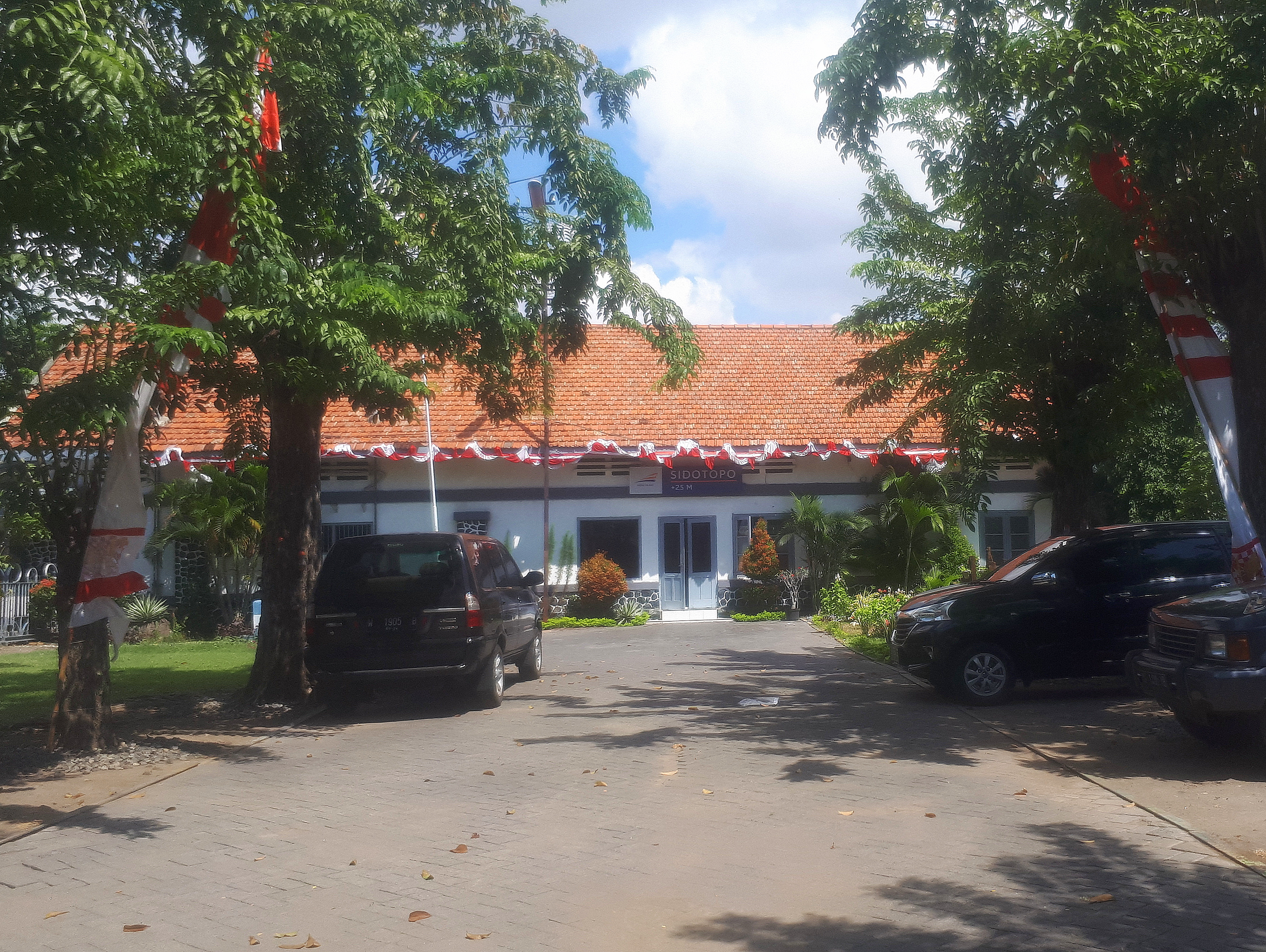 Bangunan utama Stasiun Sidotopo, Surabaya. Di tempat yang sama terdapat depot lokomotif, kereta, dan gerbong, 2020